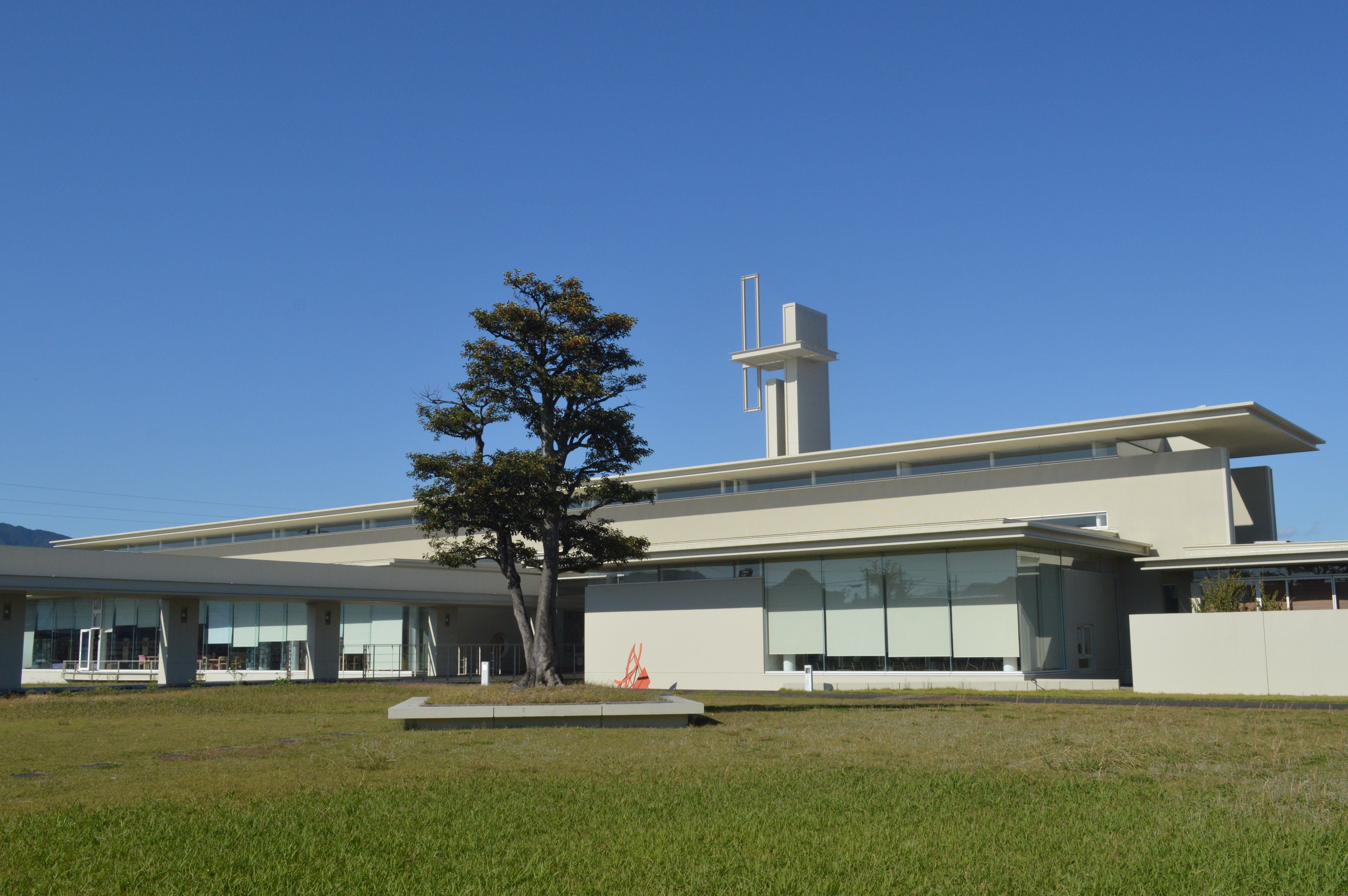 岐阜県安八郡神戸町にある神戸町立図書館。